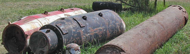 Beschreibung: diverse Grundminen / some bottom mines Fotograf: Darkone, 2. Juli 2005